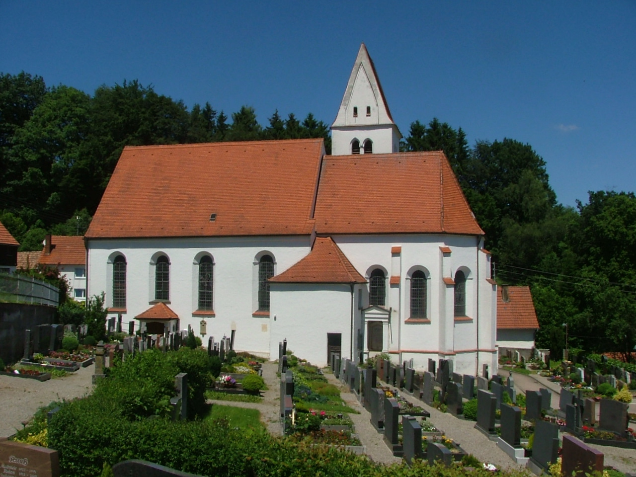 Osterberg